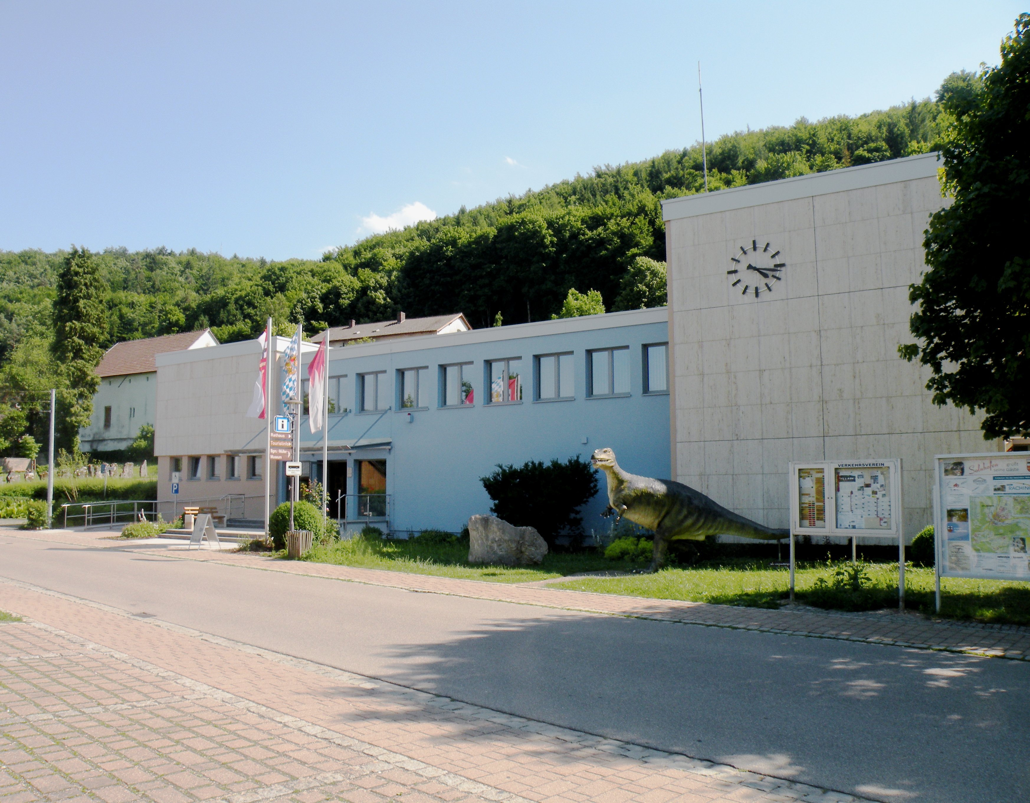 Burgermeister-Muller_Museum.Solnhofen